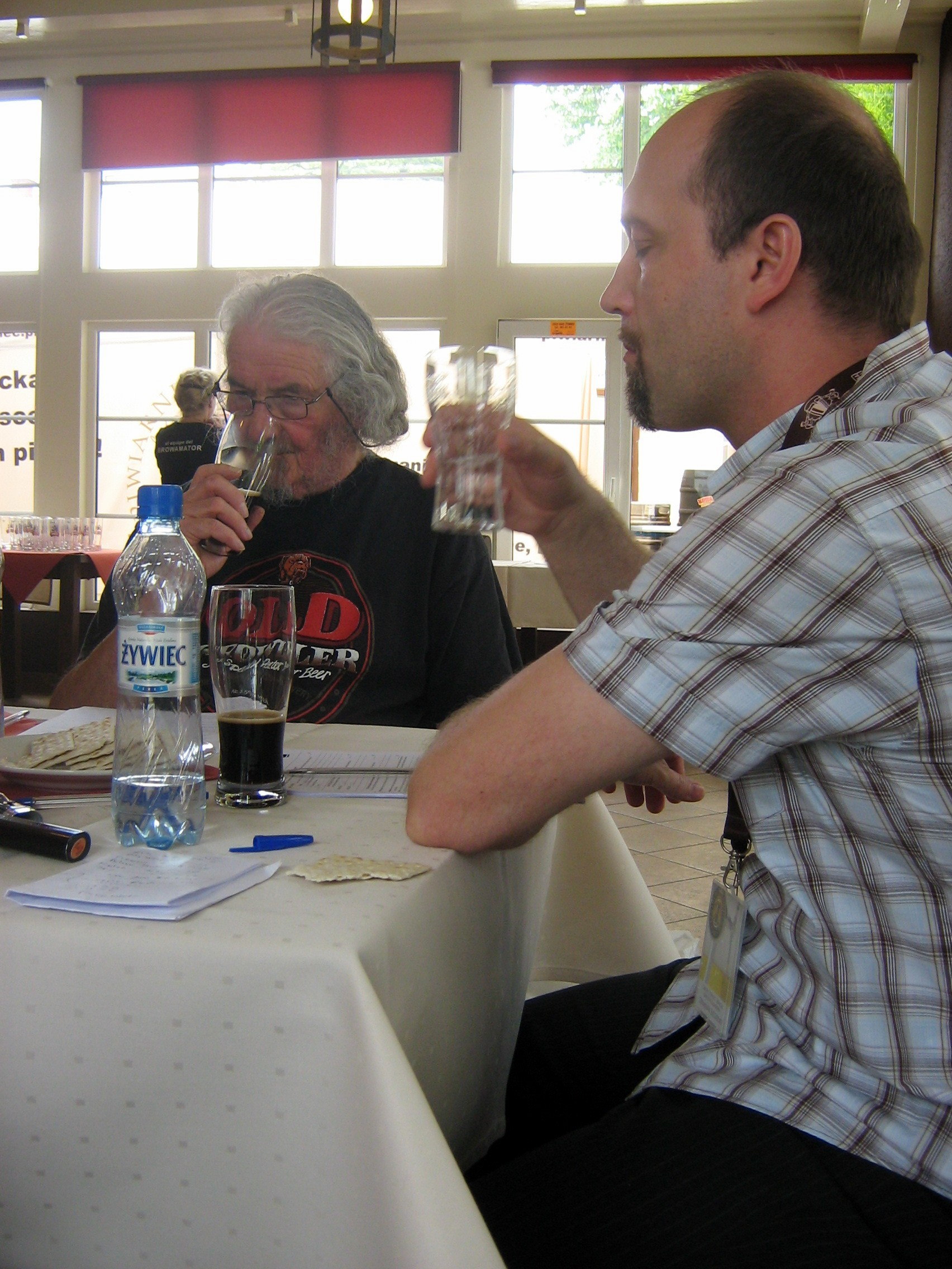 Dominik Szczodry (Bracki Browar Zamkowy) i Ian Hornsey (Royal Society of Chemistry, Anglia)